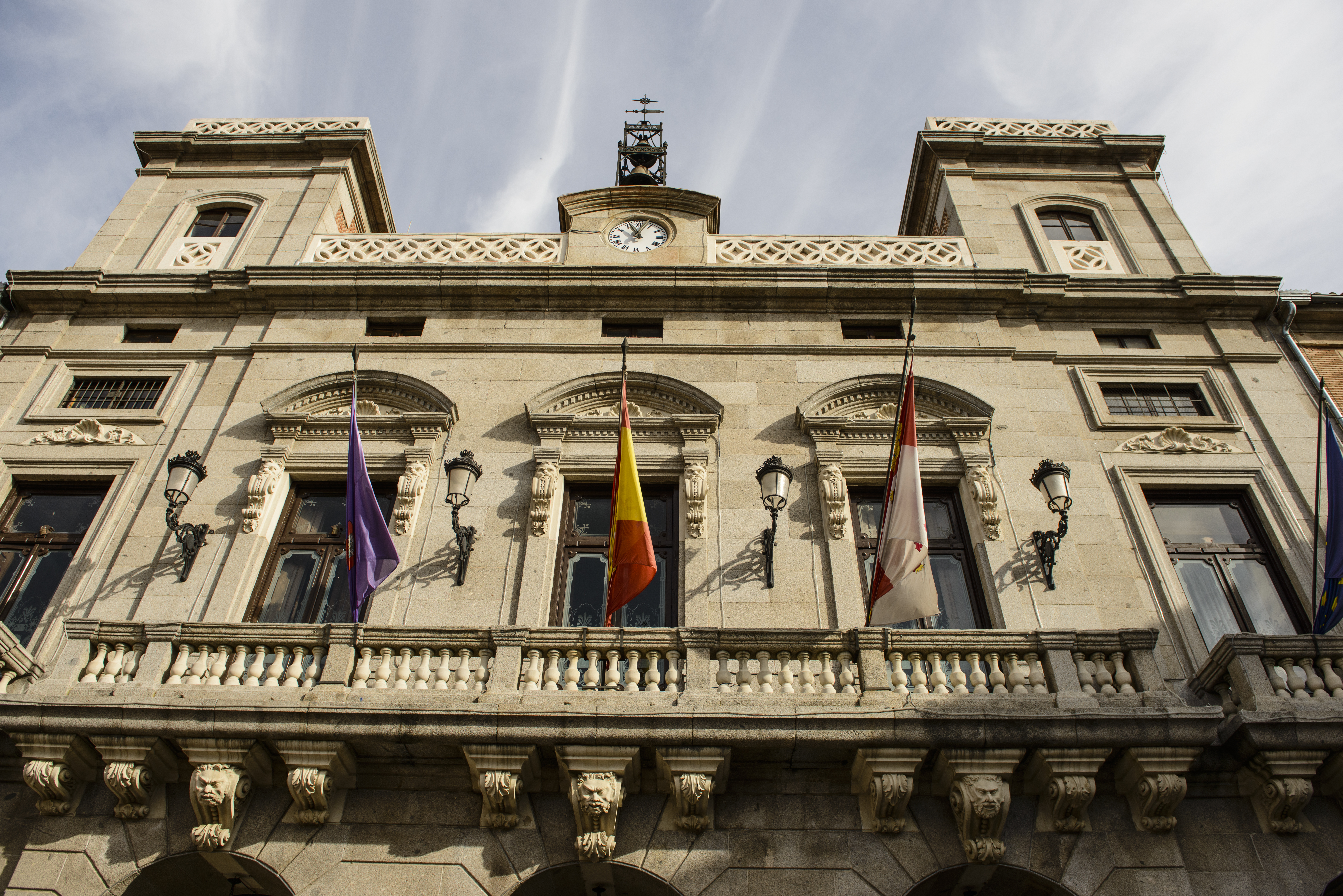 Ayuntamiento de la ciudad de Ávila, provincia de Ávila, Castilla y León, España.